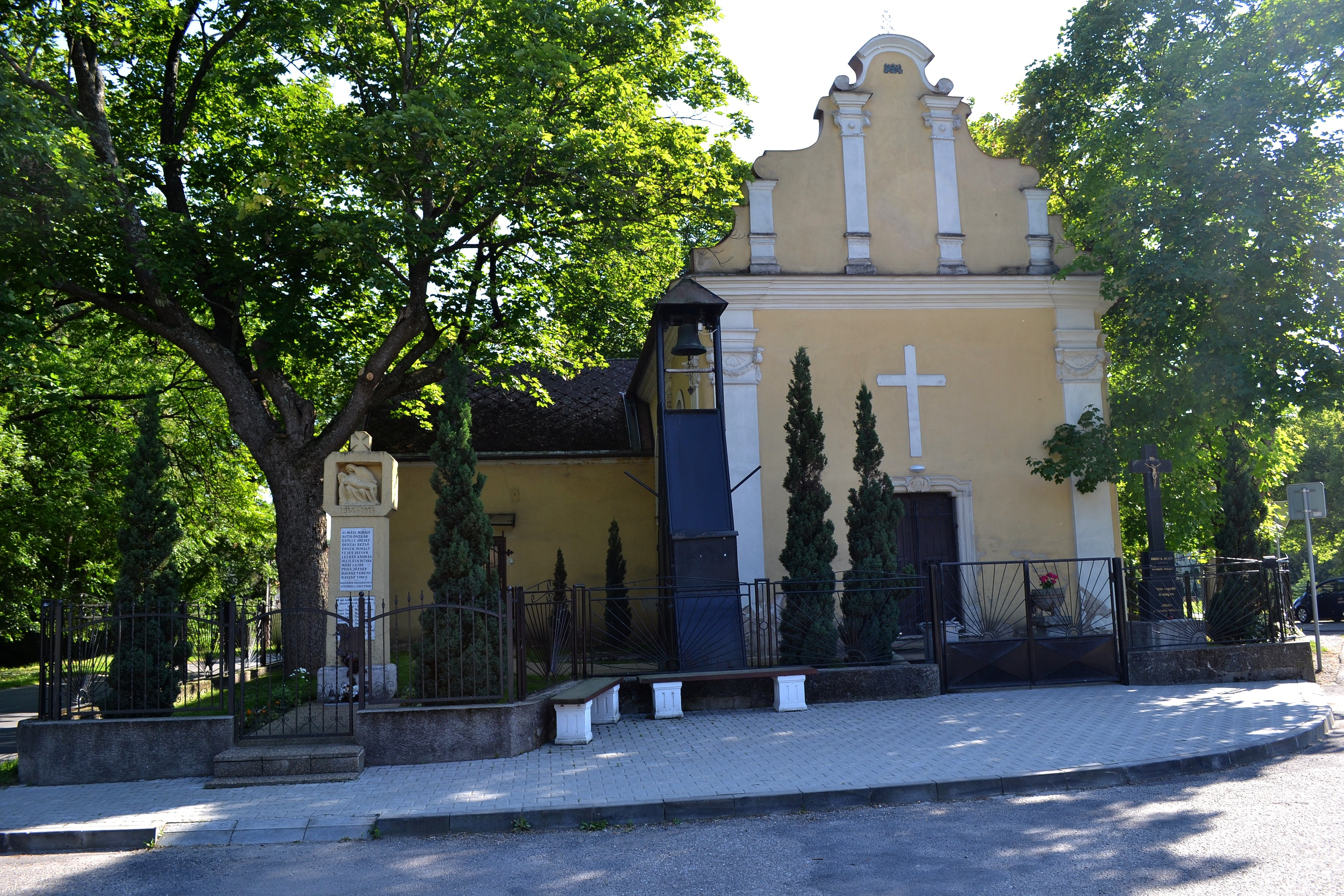 Blatná na Ostrove, Kostol Najsvätejšej Trojice; čelný pohľad. Vľavo od kostola stojí pamätník obetiam I. svetovej vojny. Autorom sochárskej časti pamätníka je Alojz Rigele